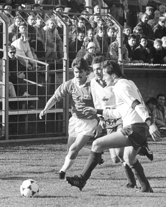 ADN-ZB-Schindler-29.10.88-pra-Berlin: Fußball-FDGB-Pokal- 1. FC Union Berlin - Dynamo Fürstenwalde 4:1 (2:1)- Gegen den Tabellenführer der Liga-Staffel A konnte der 1. FC Union nur in wenigen Phasen überzeugen. Hier versuchen die Fürstenwalder Ohrbrecht (M.) und Kaehlitz (r.) den Unionspieler Matthias Morack zu stoppen.